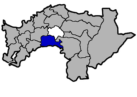 KaurJmeb為編輯臺灣省嘉義縣水上鄉，於2005年2月10日所繪。